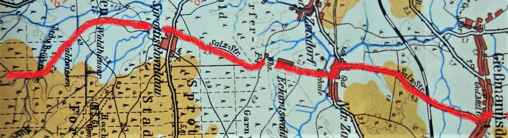 Alter historischer Salzstraßenverlauf im Sprottauer Gebiet von Neusalz nach Böhmen